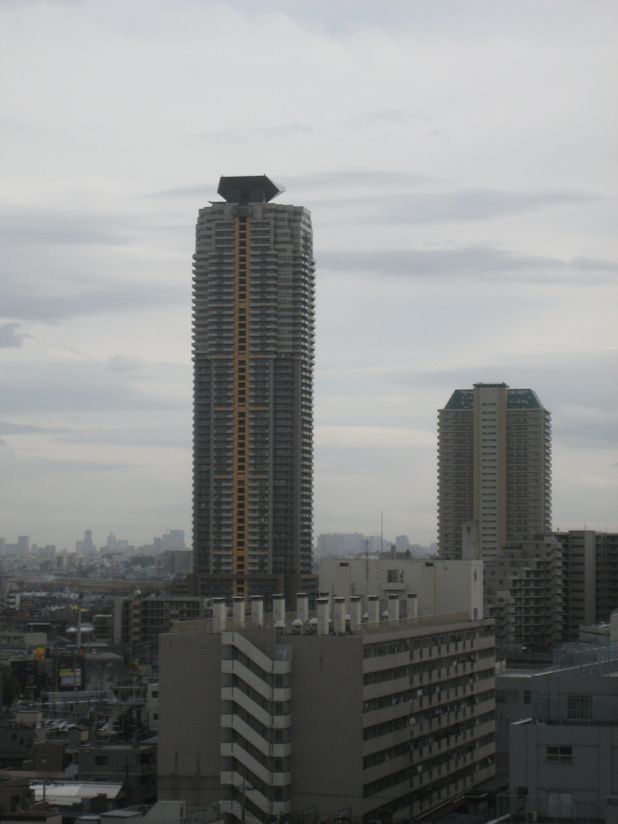 川口エルザタワー